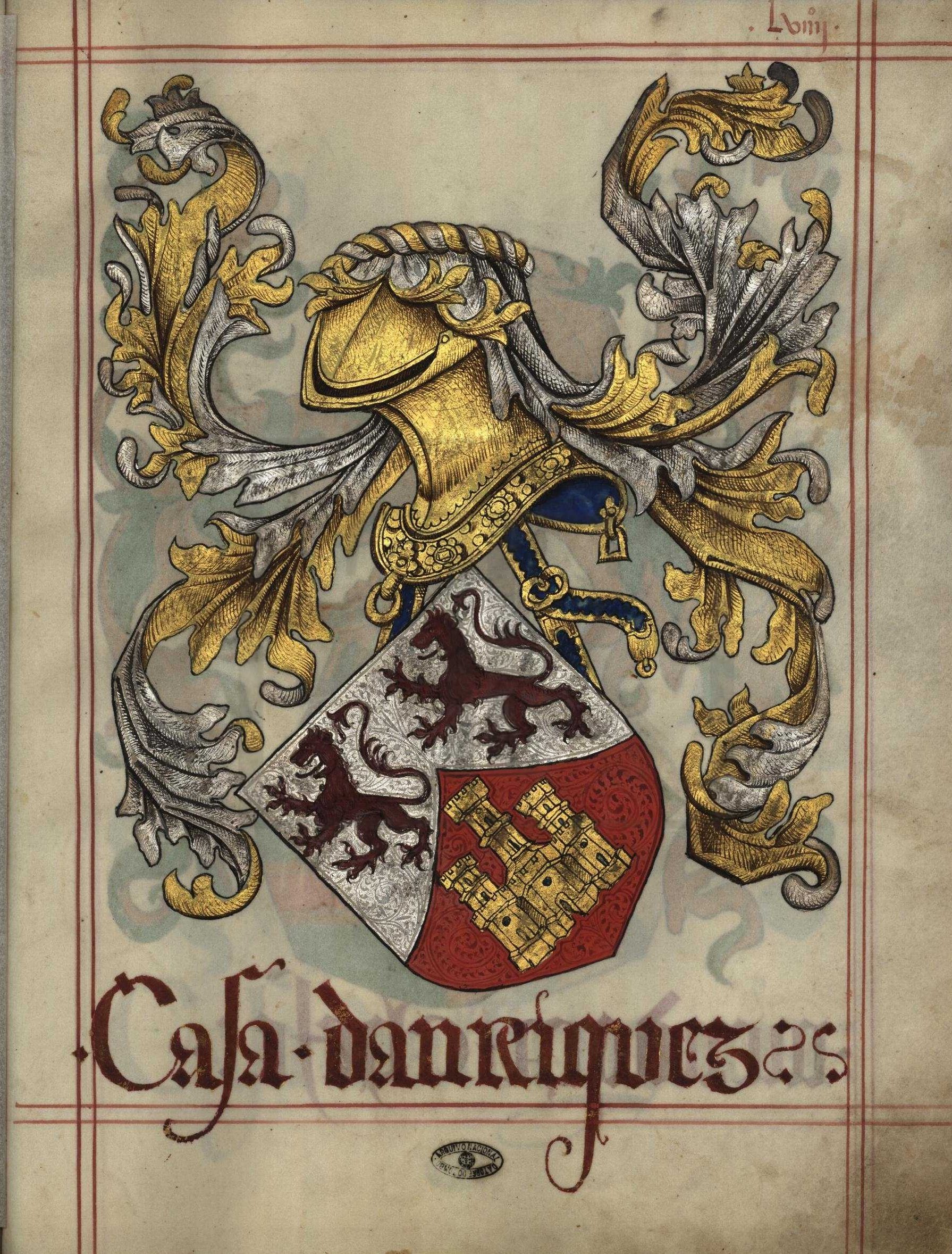 Livro do Armeiro-Mor, Henriques (fl 59)